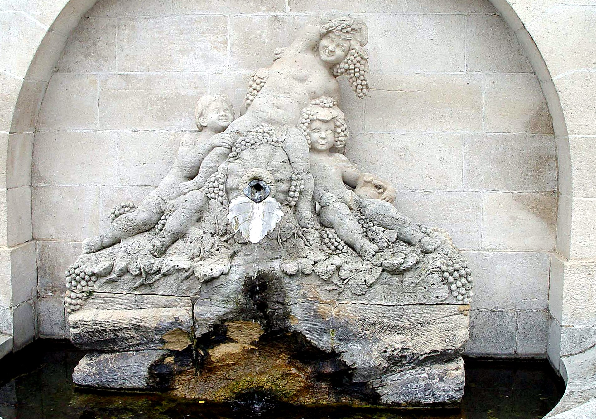 Schwéidsbengen Bur. Skulptur vum Di Domenico, Paräis.